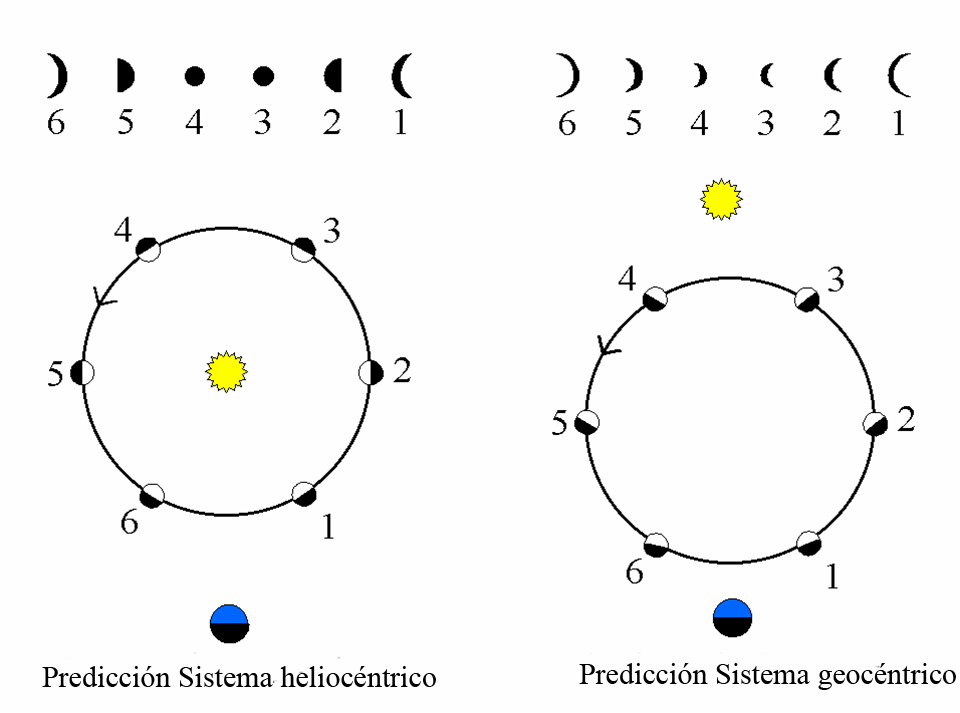 Comparación entre las predicciones de los sistemas geocéntrico y heliocéntrico del sistema solar sobre el comportamiento de las observaciones de Venus.